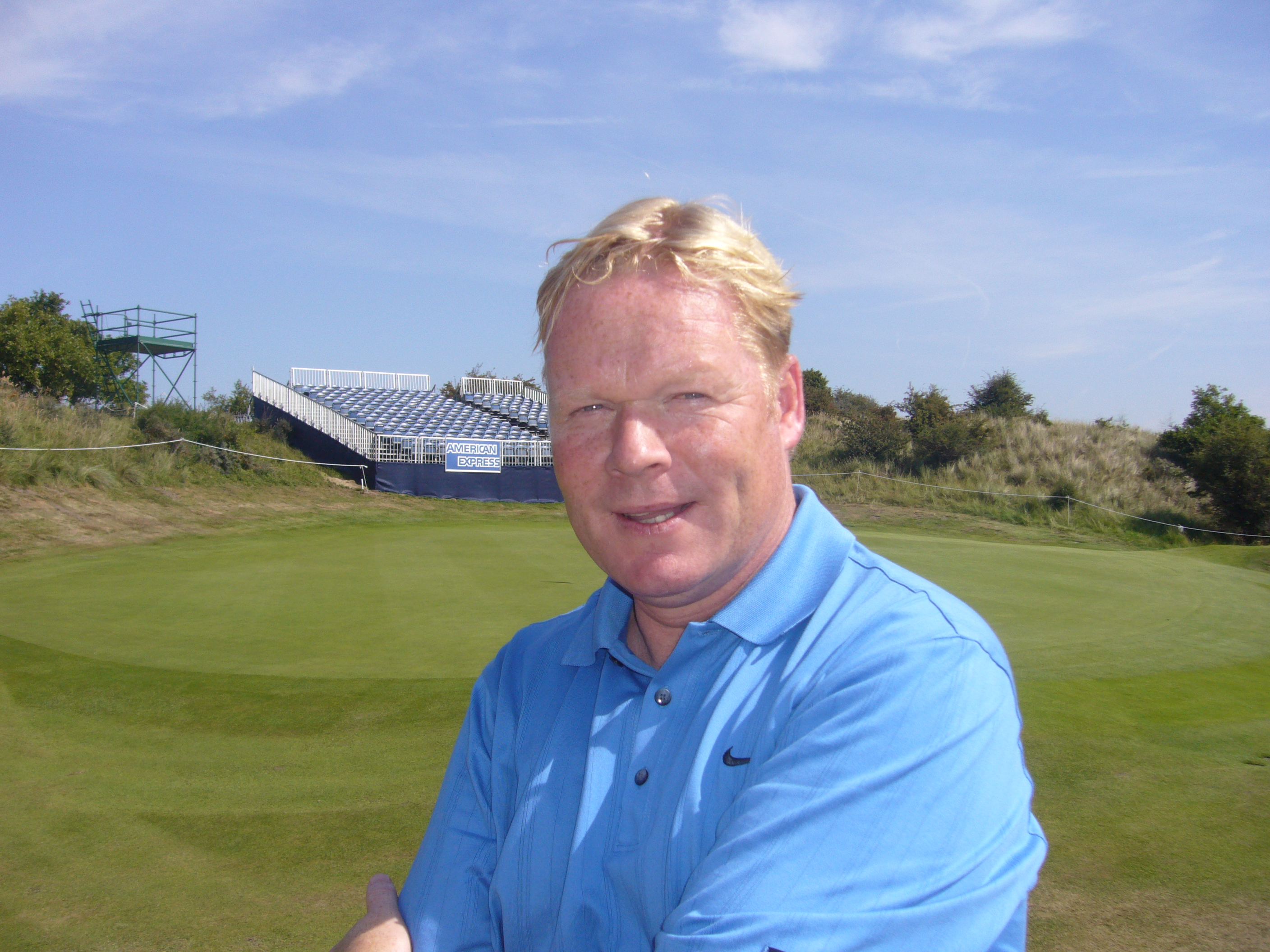 Ronald Koeman tijdens de Pro-Am van de KLM Open 2009.